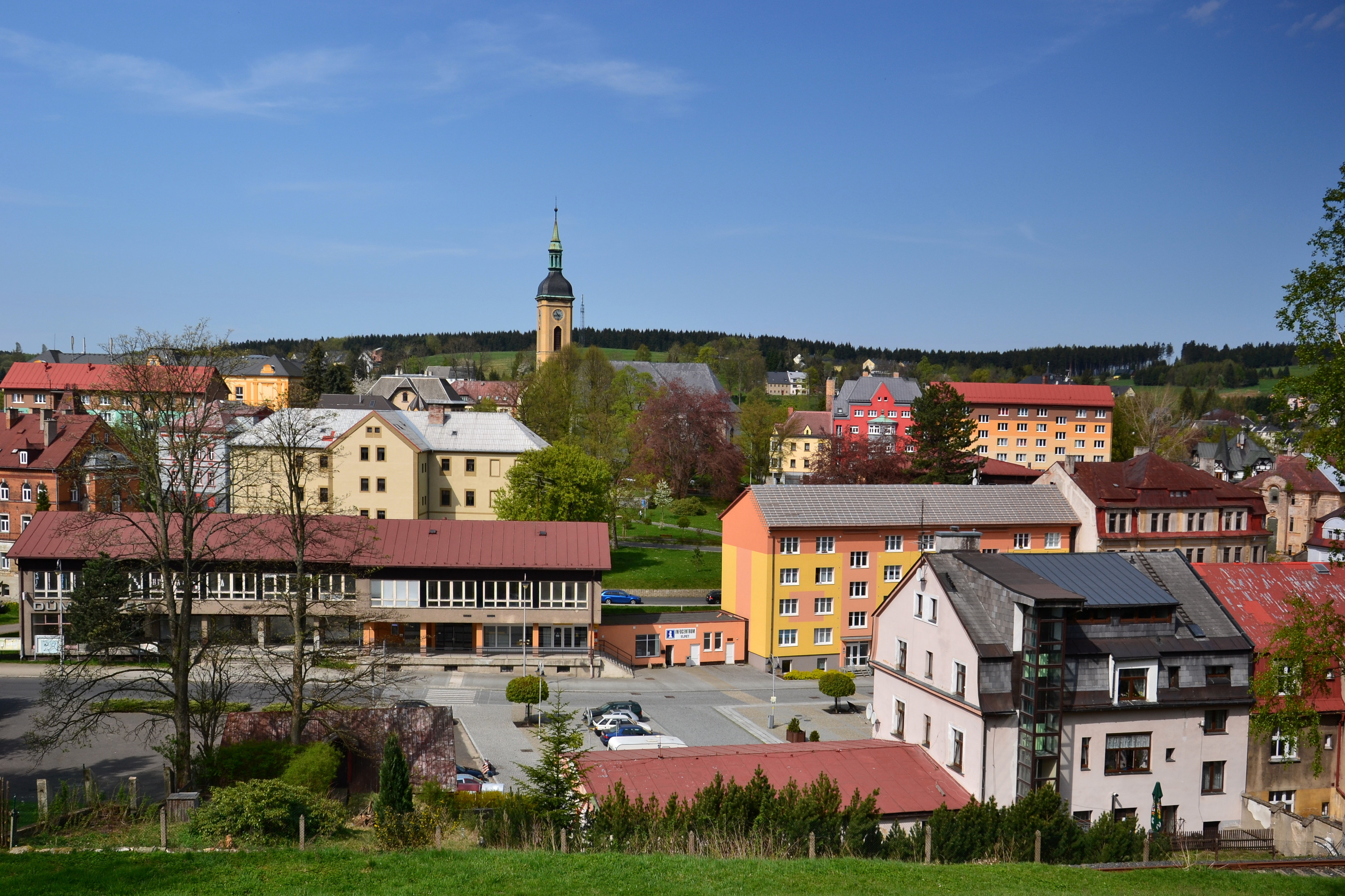 Vejprty – centrum města (pohled z ulice 1. máje)